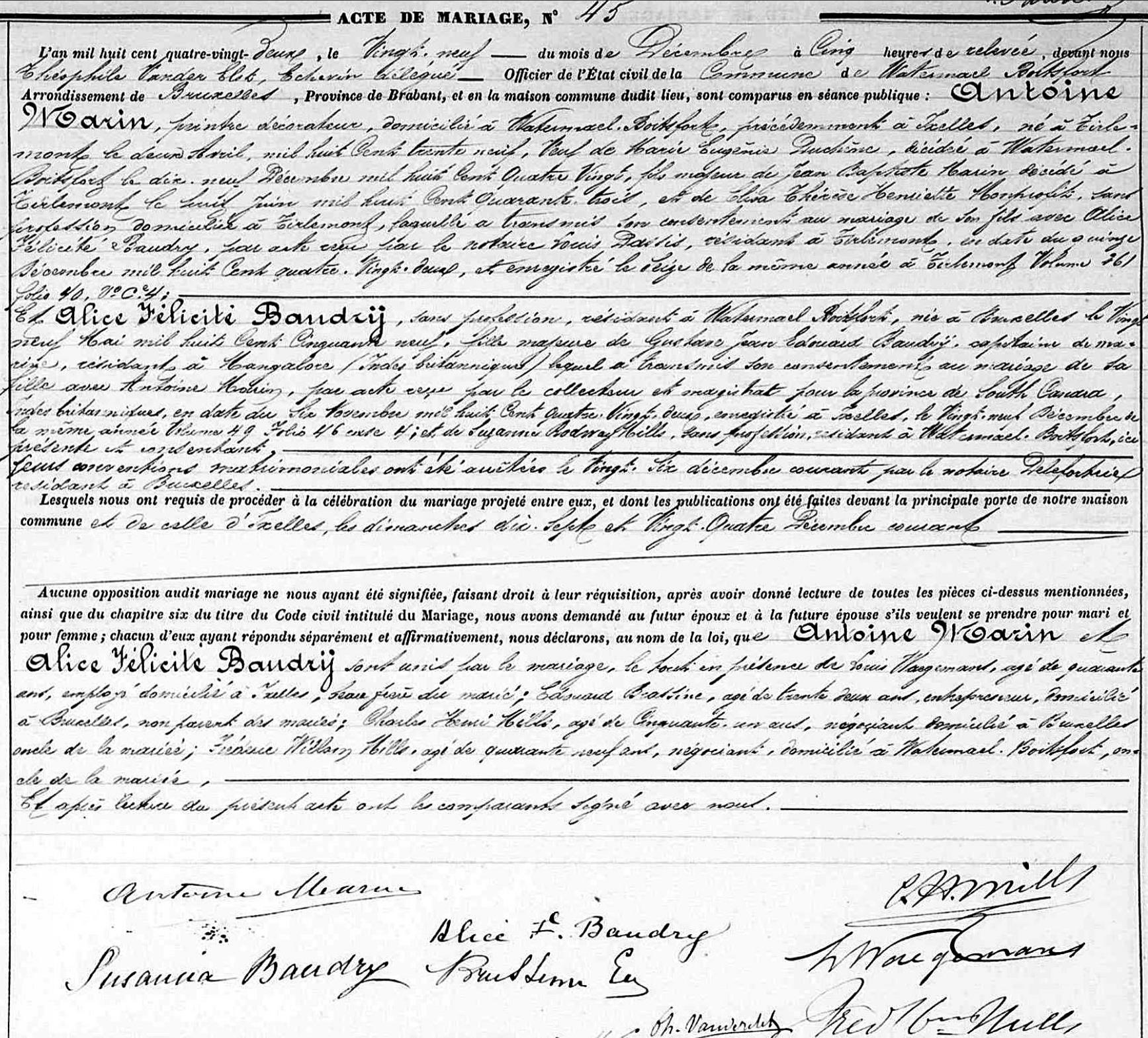 Kopie uit de registers van de burgerlijke stand van de gemeente Watermaal-Bosvoorde